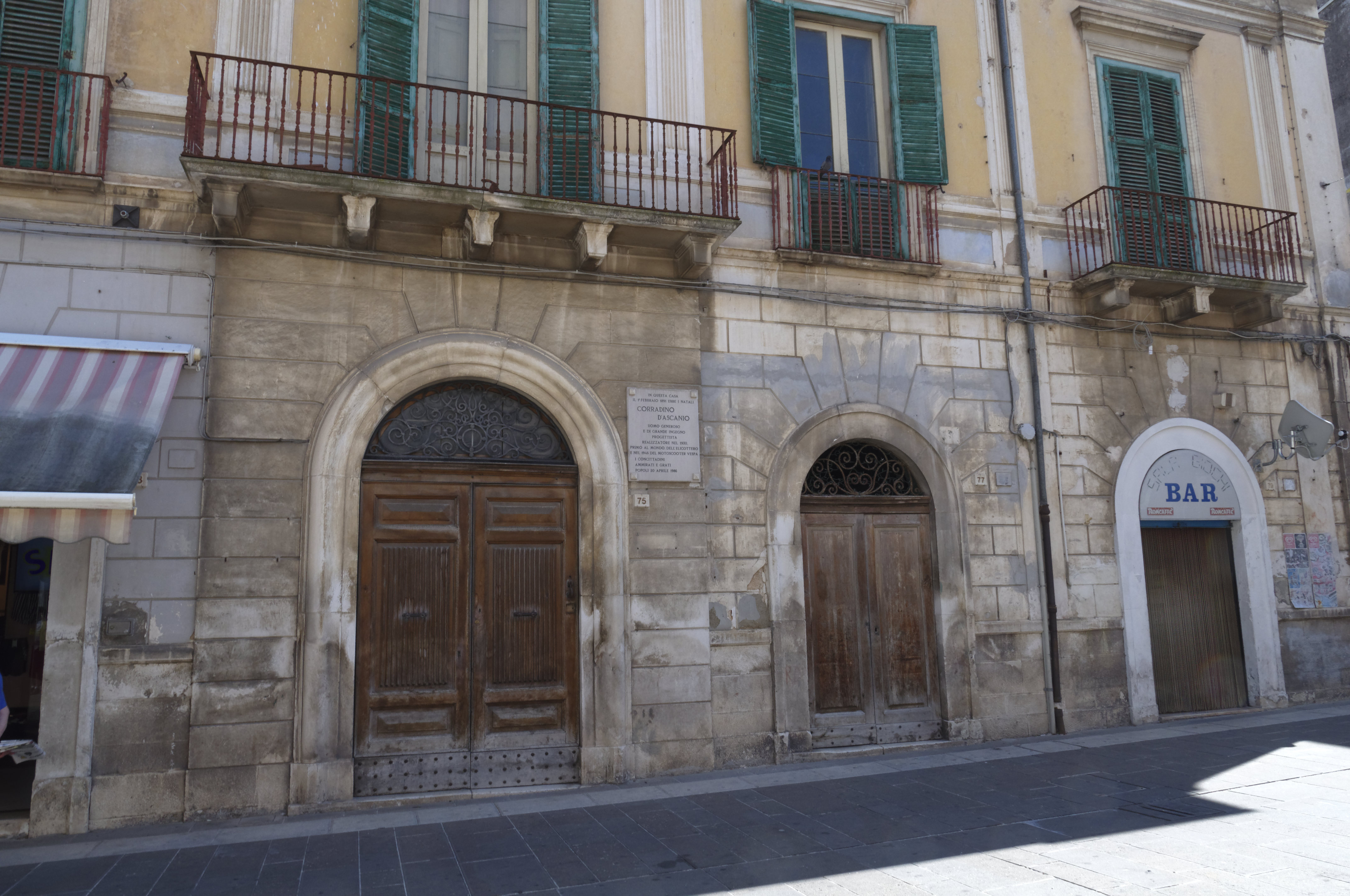 Popoli 2016